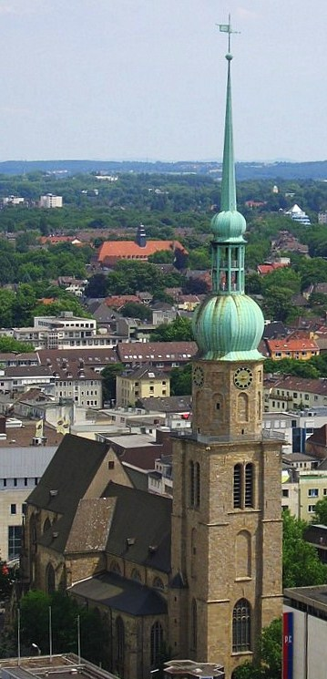 Die Reinoldikirche vom RWE Tower fotografiert.